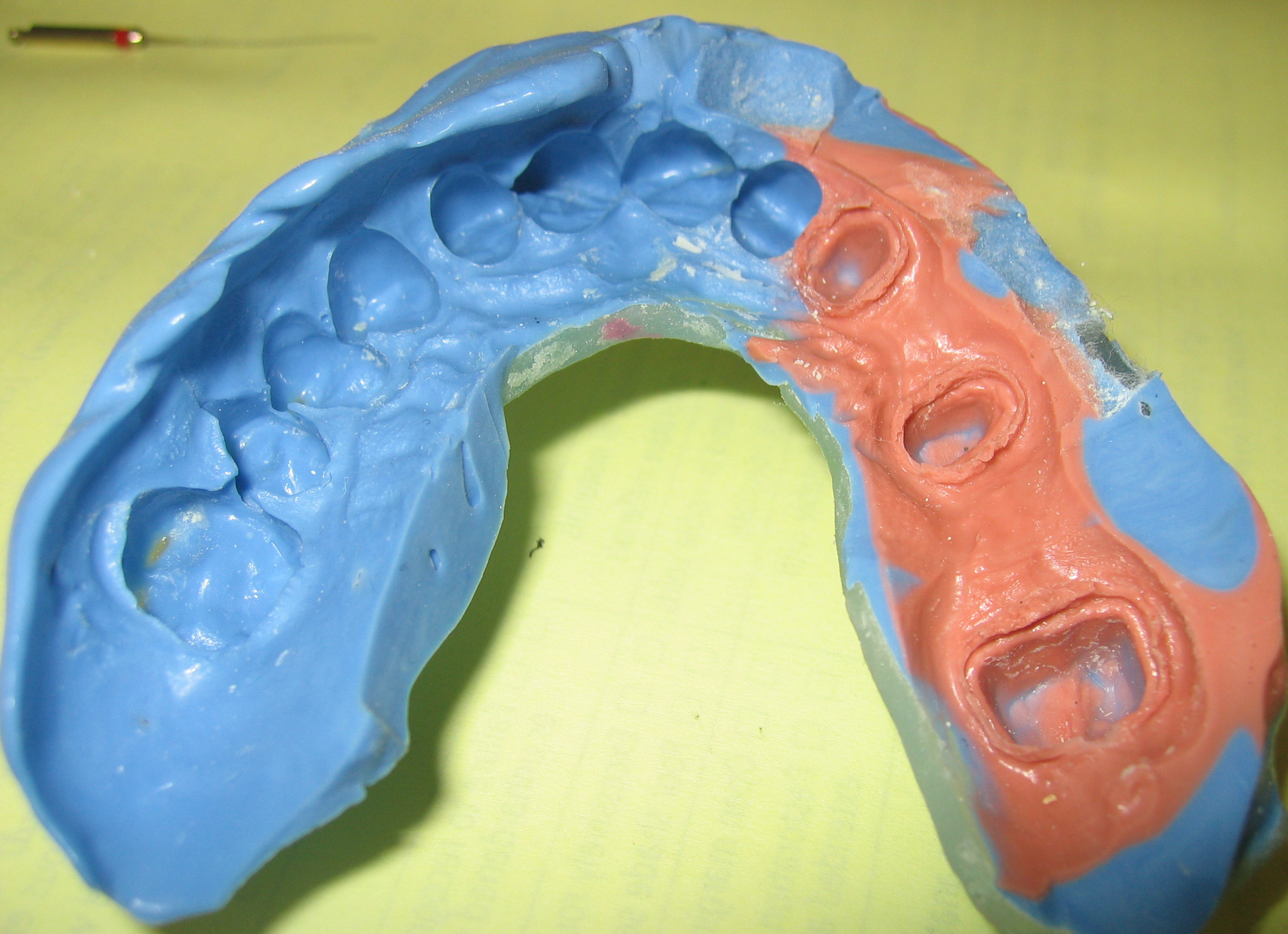 dental imprint